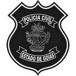 Este é o logo da Polícia Civil do Estado de Goiás.